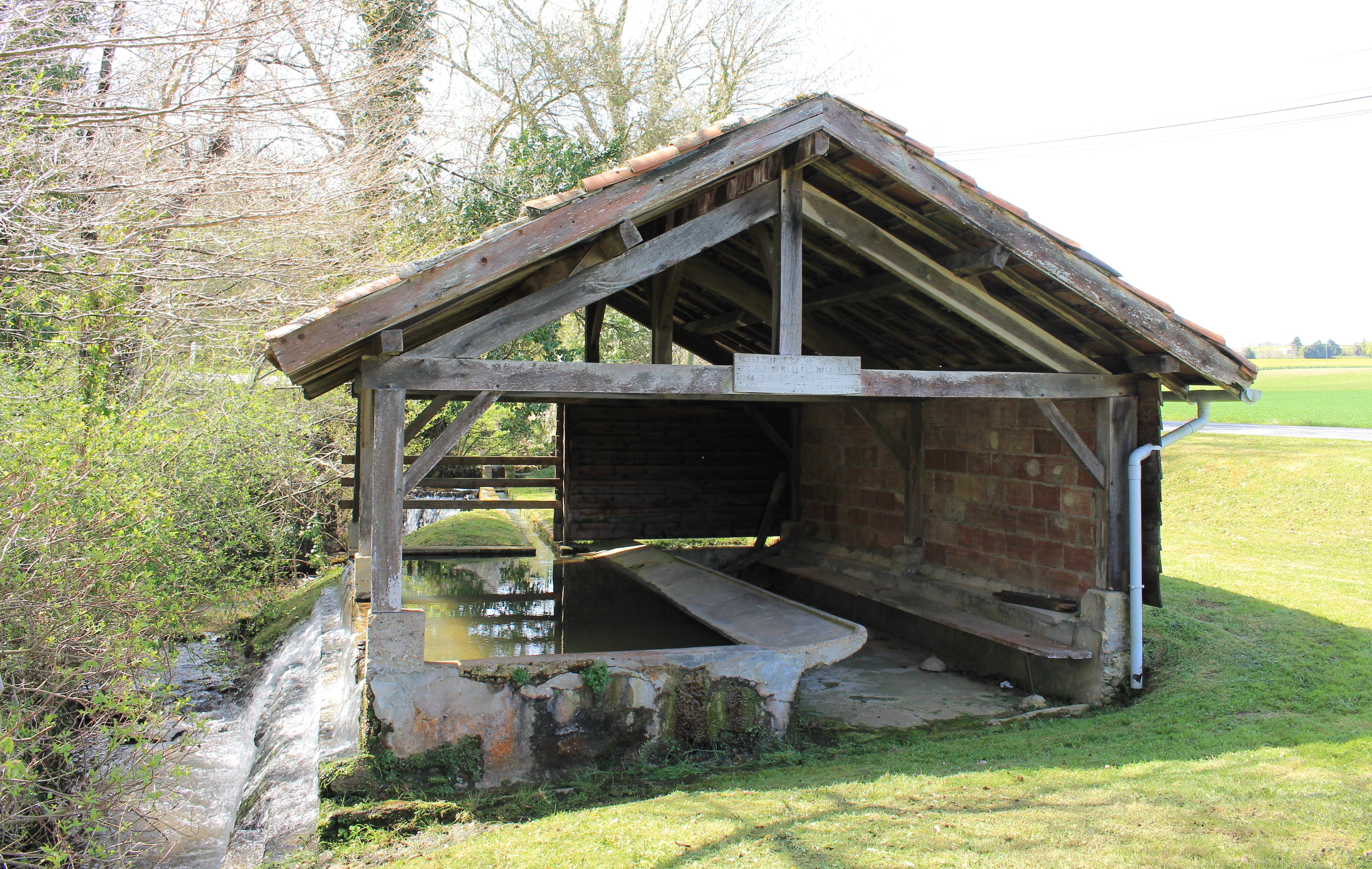 Lavoir de Libaros (Hautes-Pyrénées)